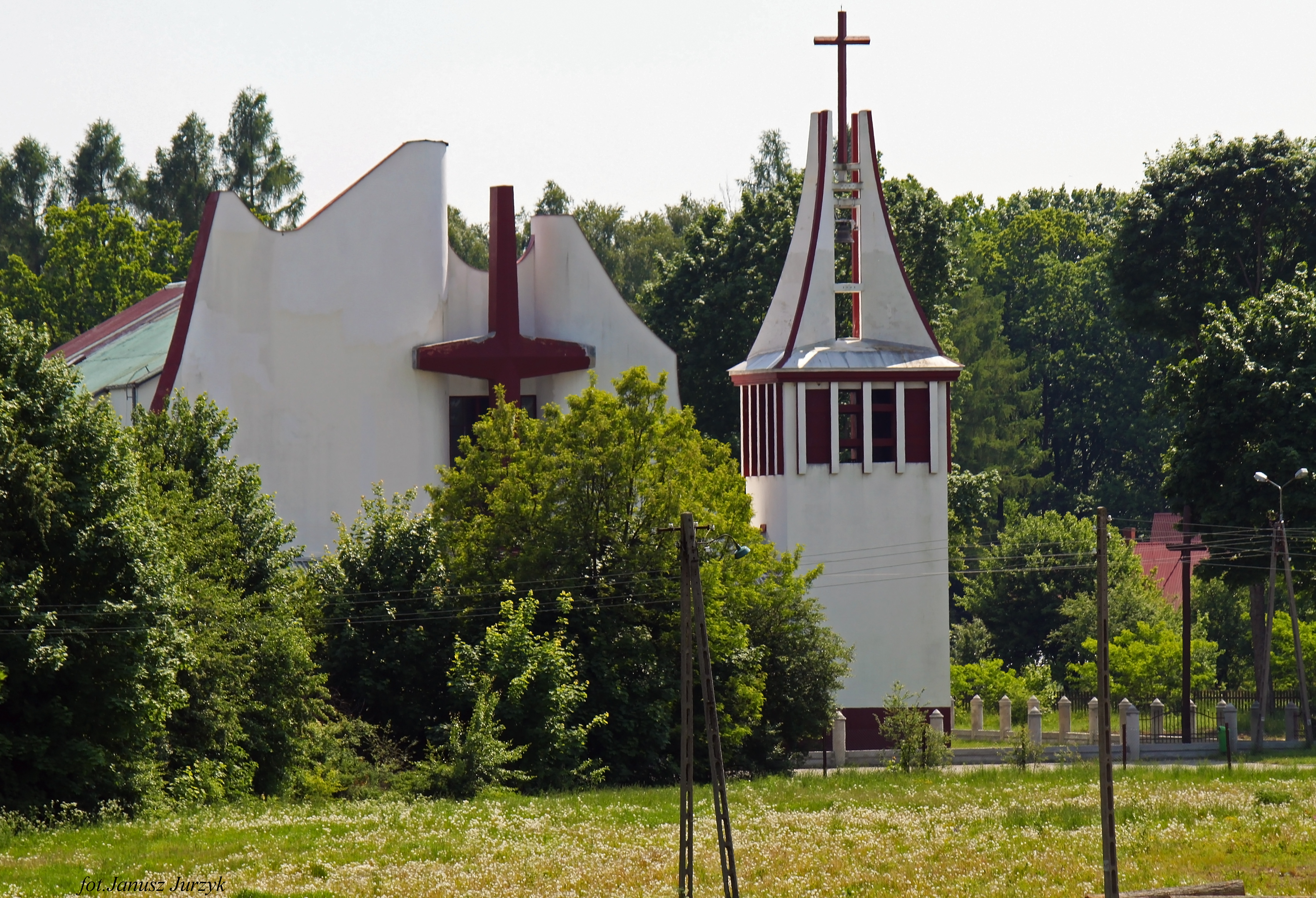 Parafia Matki Bożej Częstochowskiej w Nurcu-Stacji.